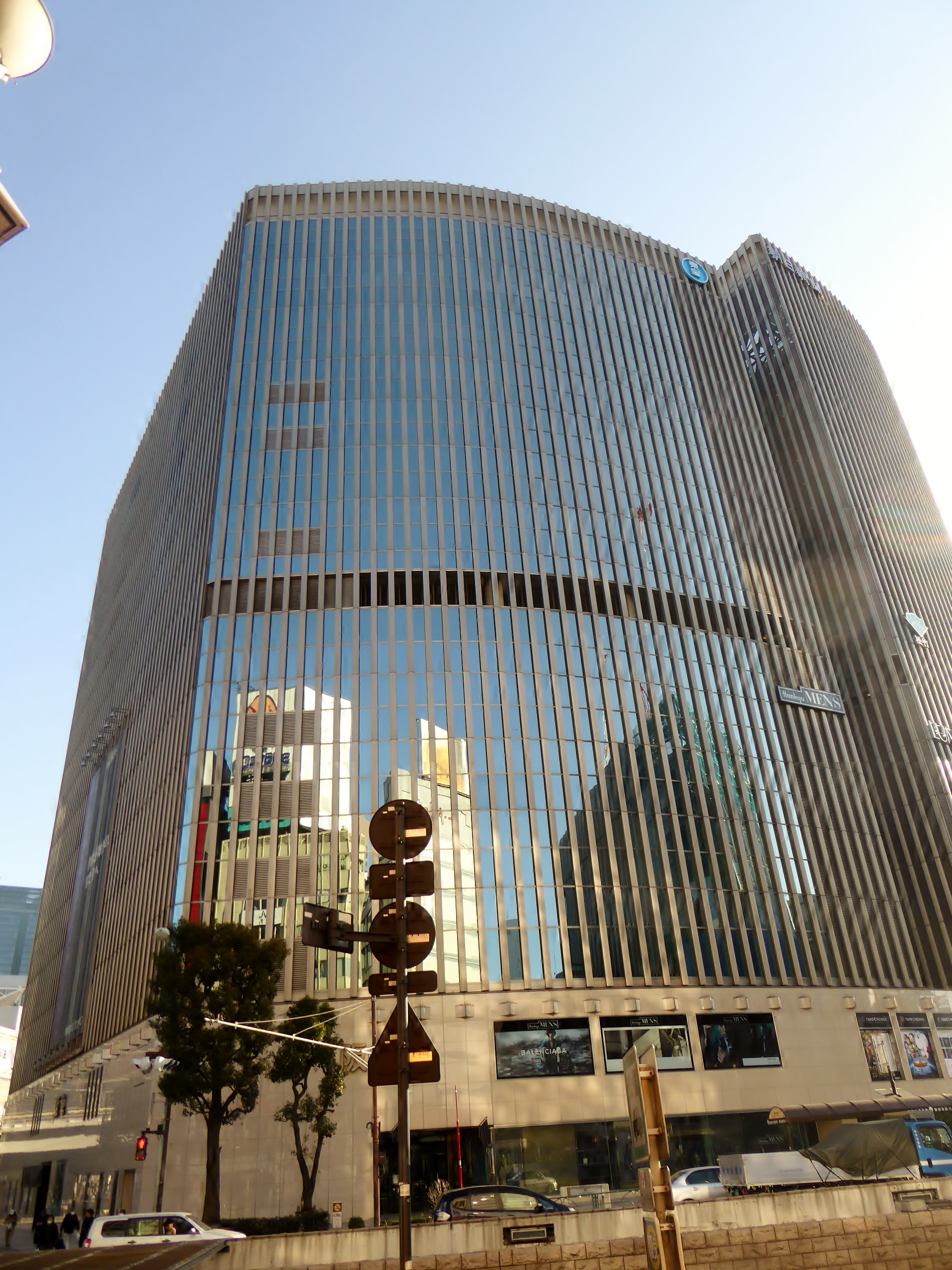 有楽町センタービルを撮影。